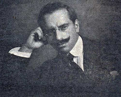 Nino Berrini